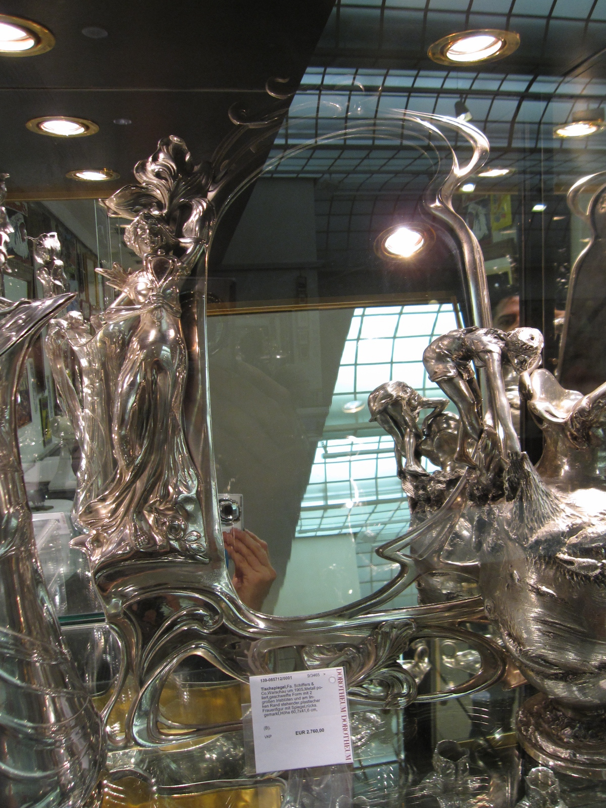 Tischspiegel, Firma Schiffers & Co., Warschau, um 1905. Metall poliert, geschweifte Form mit zwei großen Irisblüten und am linken Rand stehender, plastischer Frauenfigur mit Spiegel, rückseitig gemarkt. Höhe 60,7 x 41,6cm.